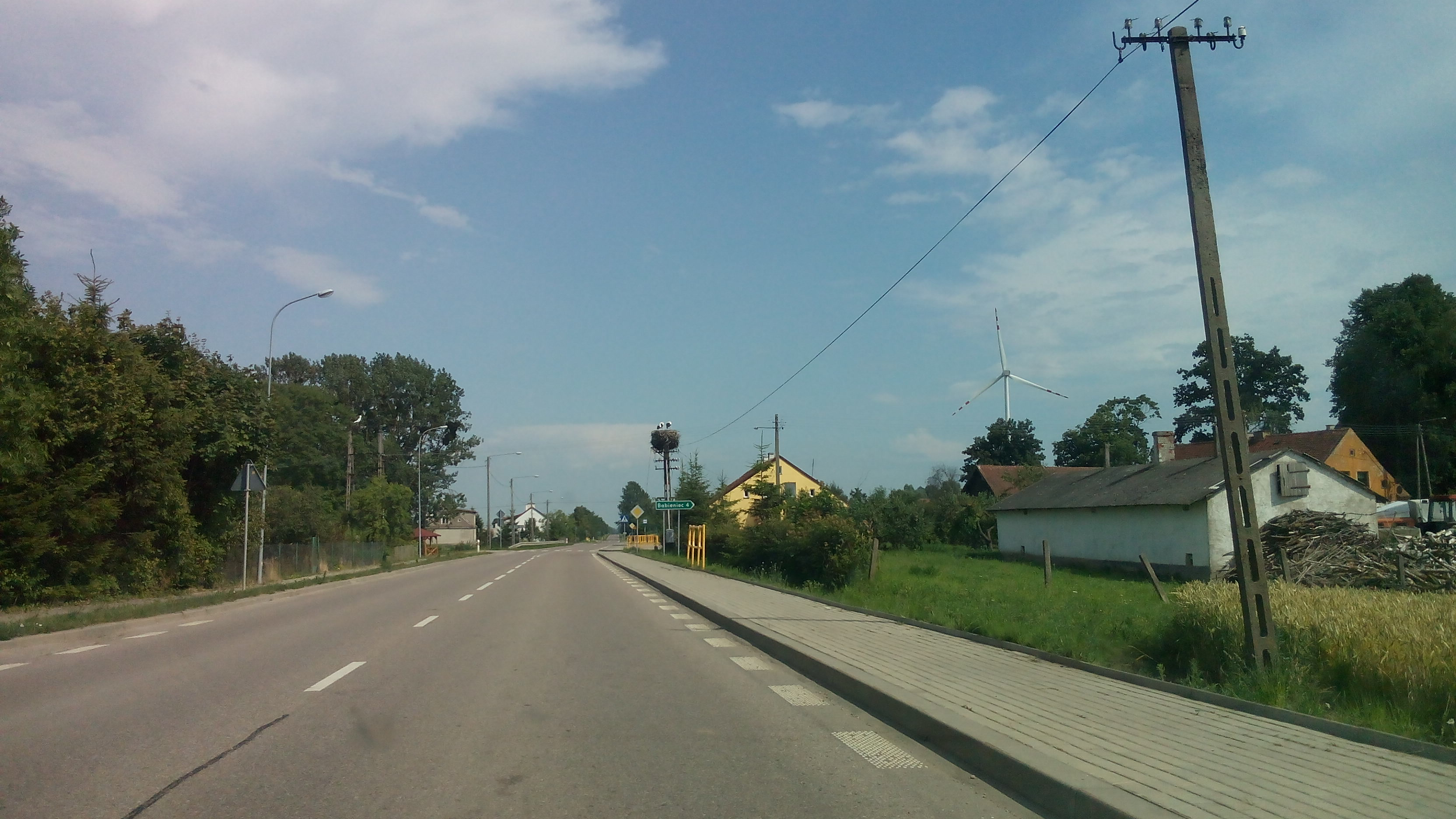 Gniazdo bociana białego znajdujące się we wsi Kraskowo